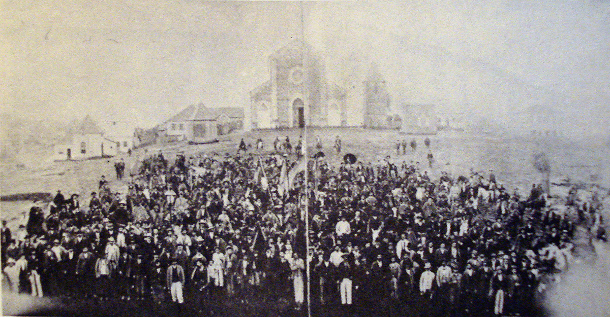 Concentração de eleitores na Praça Dante Alighieri em Caxias do Sul